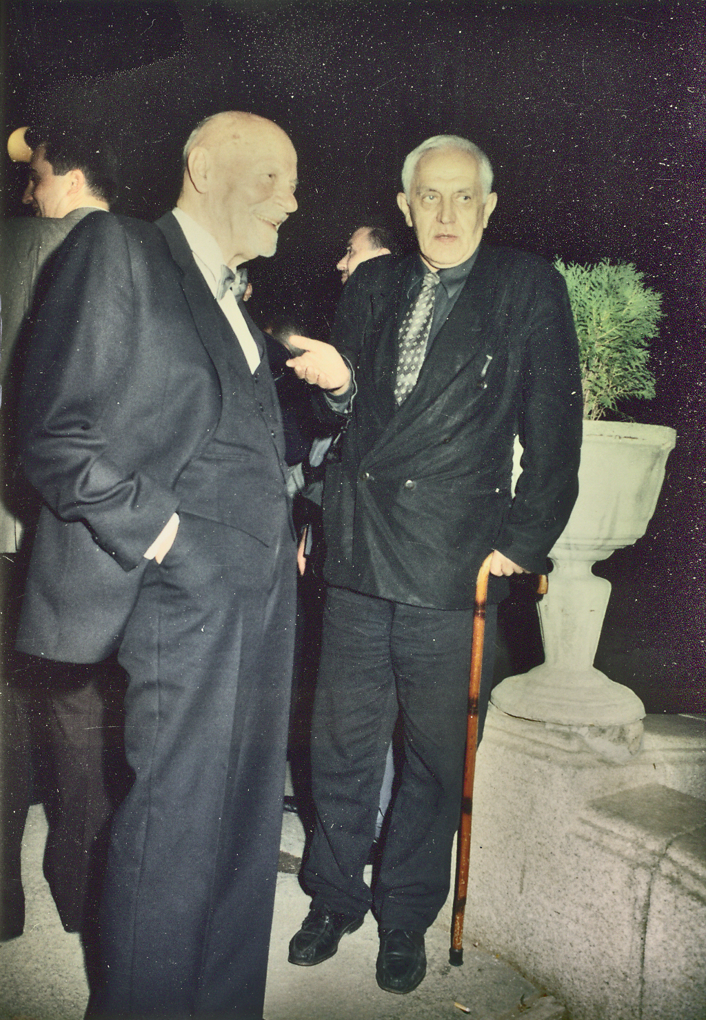 Mića Tomić i Ljuba Tadić na Filmskim susretima u Nišu 1997. godine